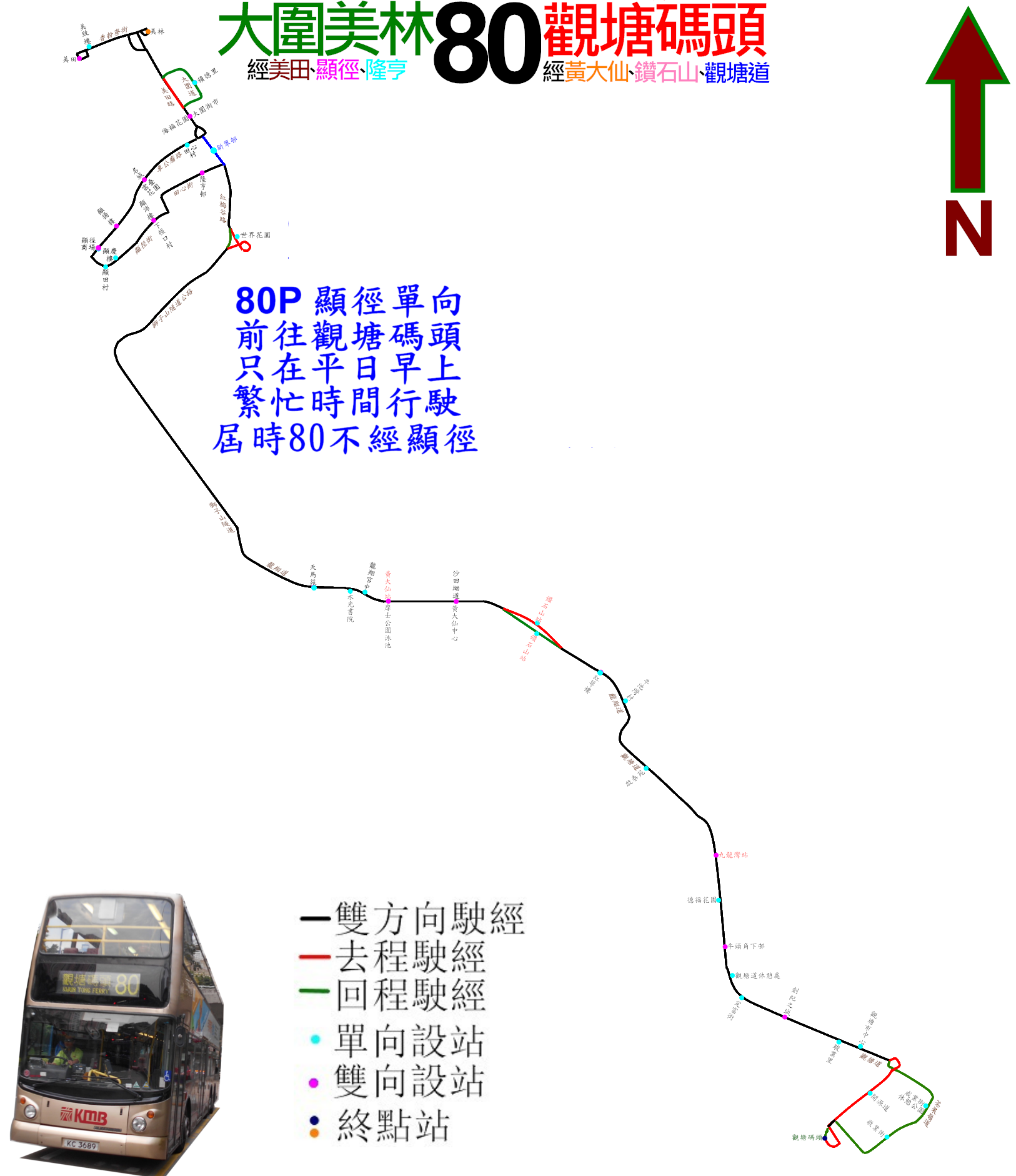 中文（香港）: 九巴80線的走線圖